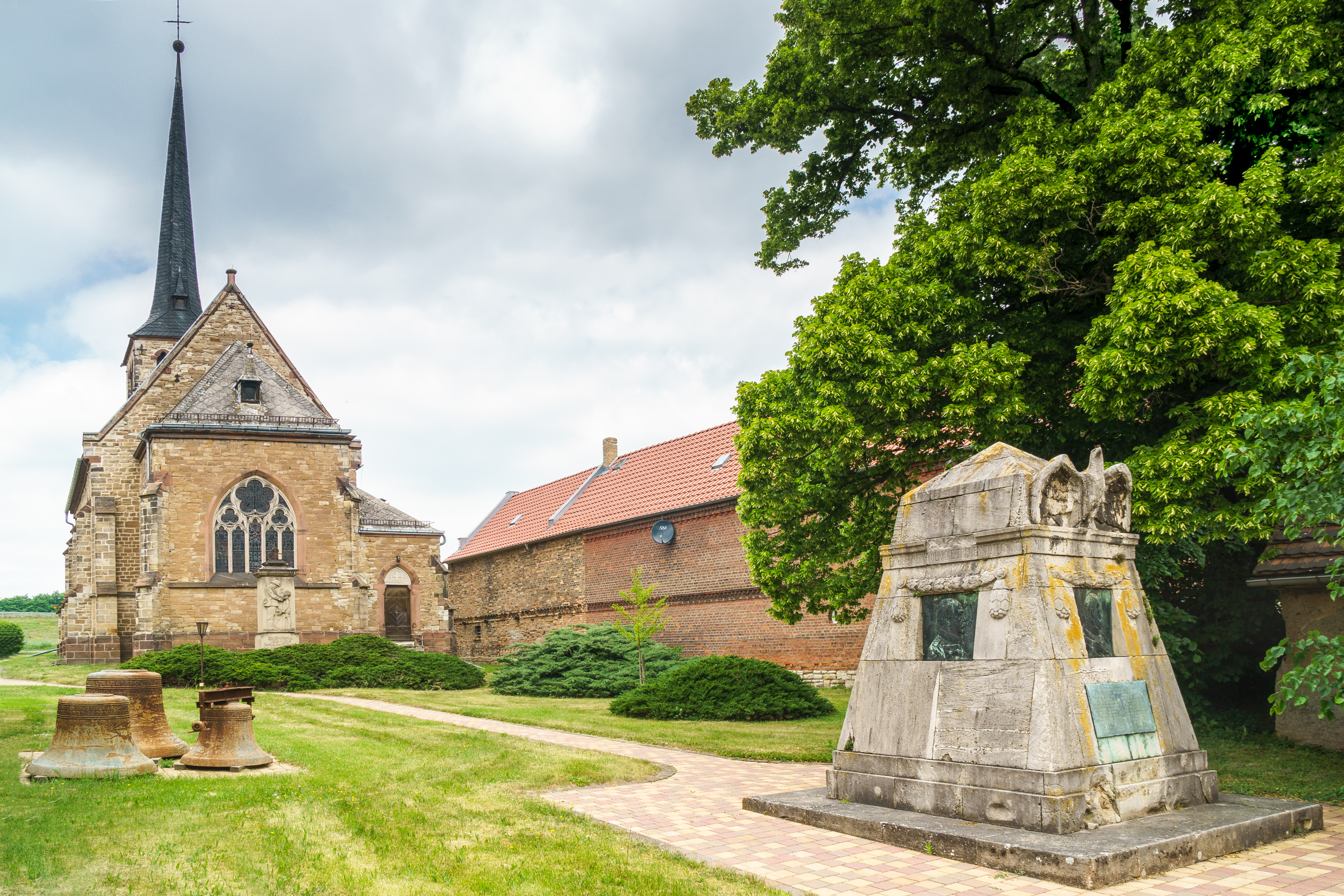 Kirche, Denkmal für Gefallenen des Deutsch-Französischen Krieges 1870-71 und Denkmal WK I auf dem Kirchhof in Weißenfels OT Kriechau